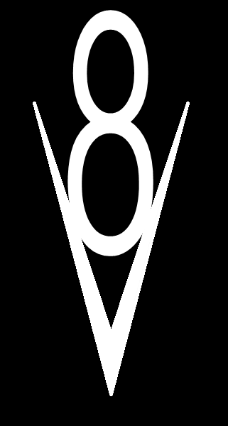 Adaptación libre del logotipo V8 utilizado por Ford en sus automóviles de 1939 a 1951